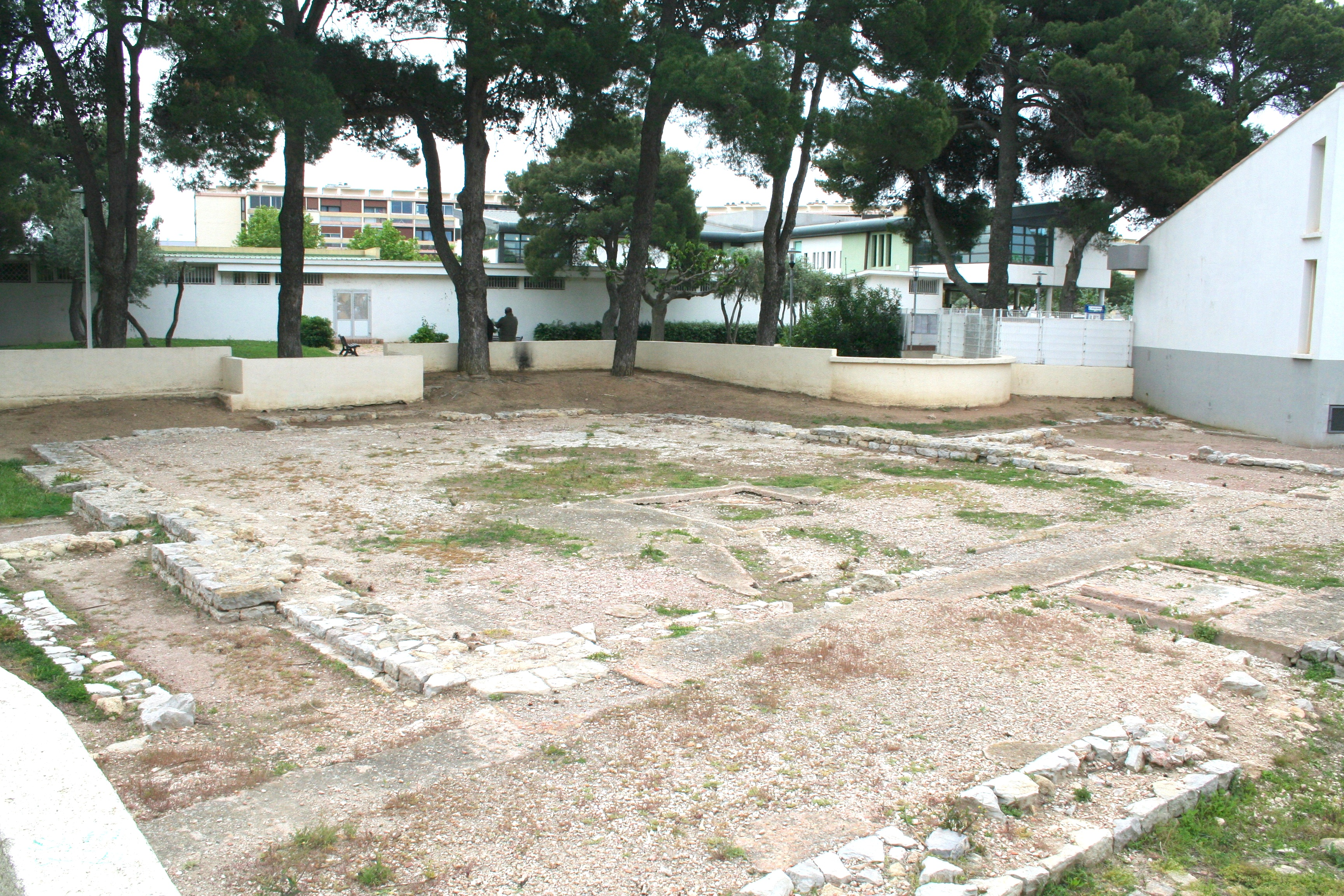 Balaruc-les-Bains (Hérault) - édifice religieux gallo-romain dédié à Neptune et ses nymphes.